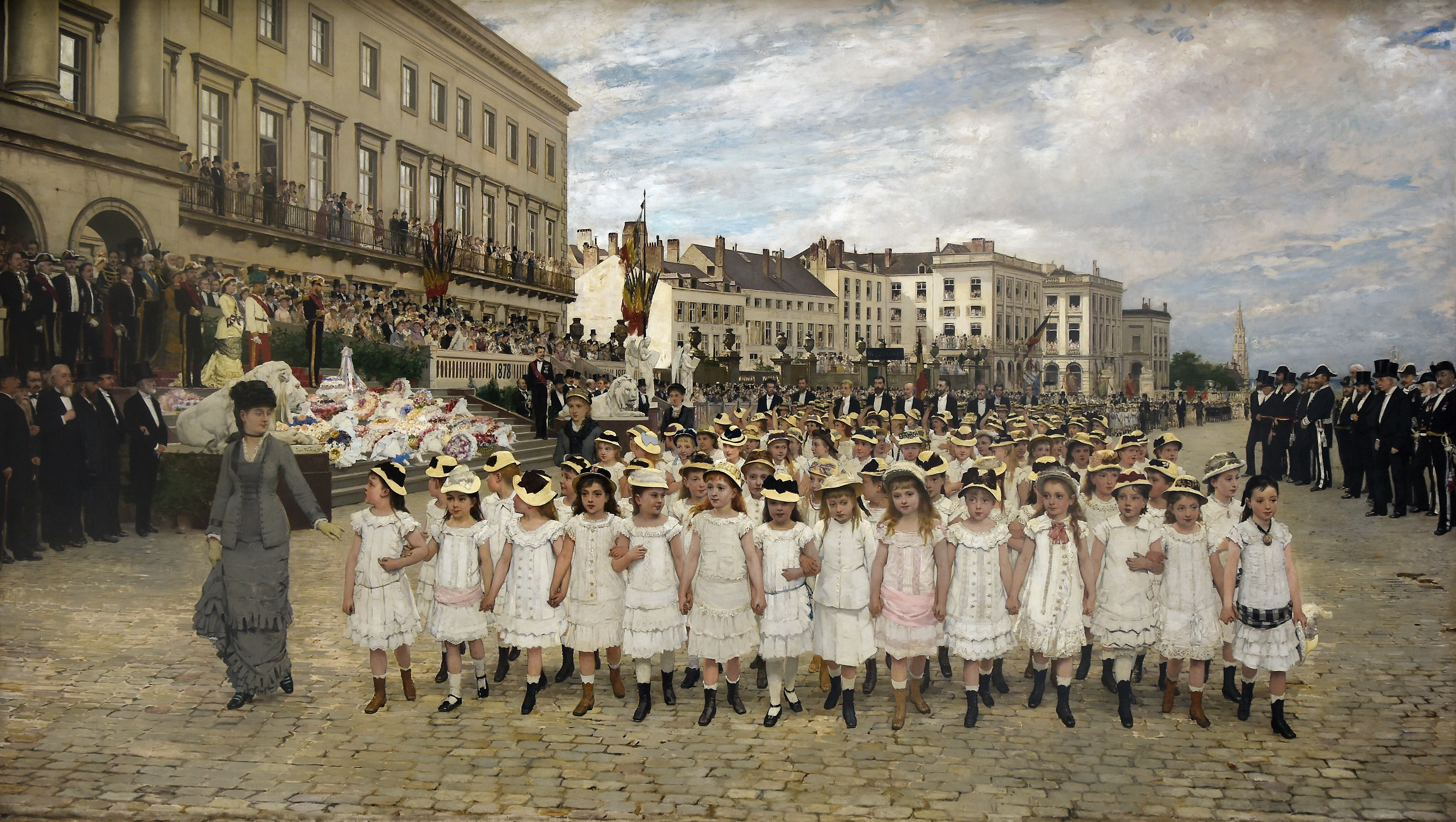 Jan Verhas (1834-1896) Optocht van de scholen in 1878 - Old Masters Museum Brussel 30-4-2017